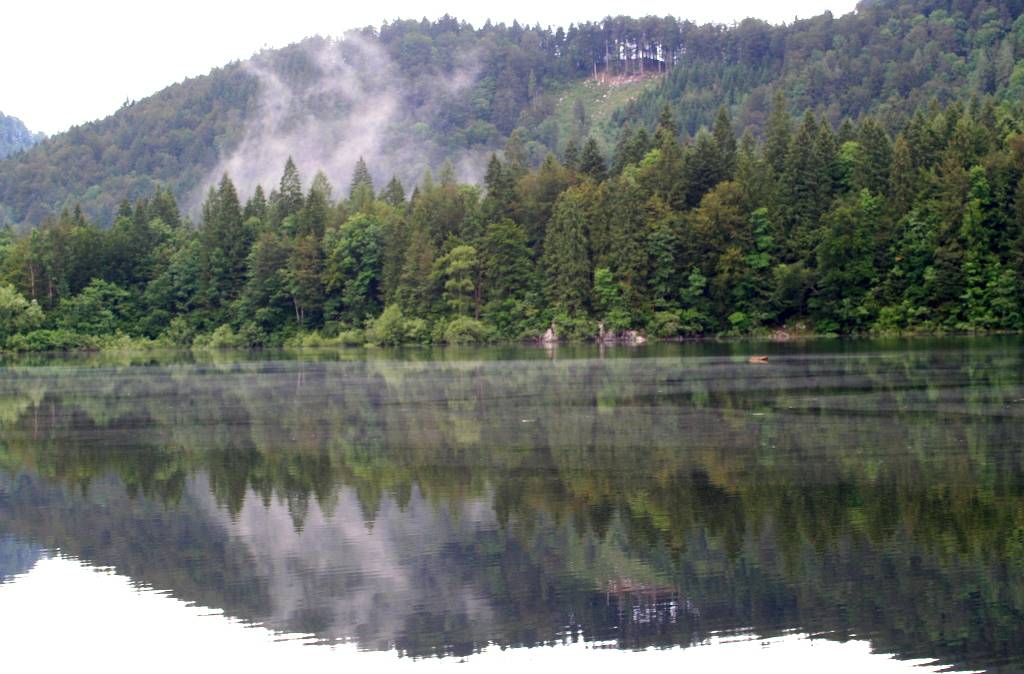 Východní břeh jezera Schwarzensee